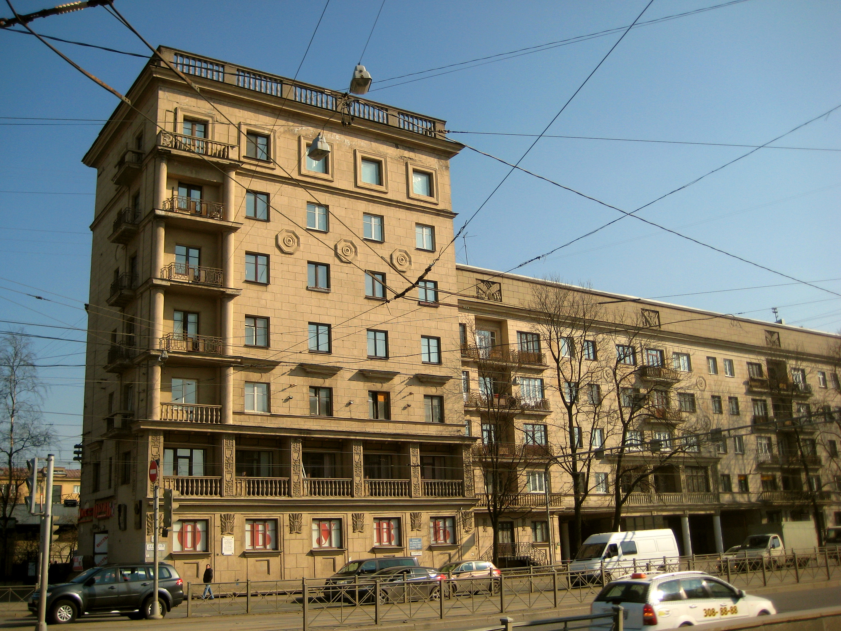 Дом специалистов (1930-е годы постройки), в котором жили в т.ч. радиотехник М.А. Бонч-Бруевич и химик В.Г. Хлопин: Лесной проспект, дом 61, корпус 1, Выборгский район, Санкт-Петербург